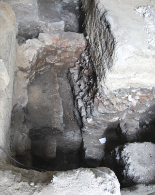 Vestiges d'un four à cloche découvert dans la chapelle Saint-Libert de Tours lors des fouilles de 2012